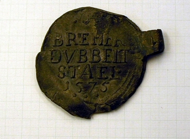 Tuchplombe, Blei, Bremen, um 1630-1700, Focke-Museum Bremen